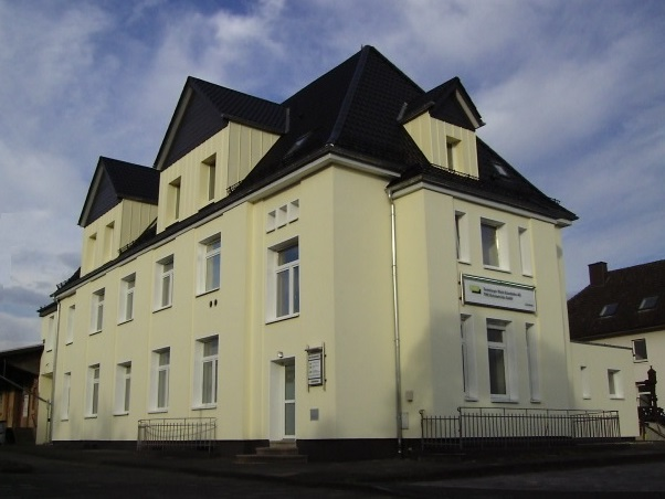 Unternehmenssitz der Teutoburger Wald-Eisenbahn (TWE) in Gütersloh, Am Grubenhof 2